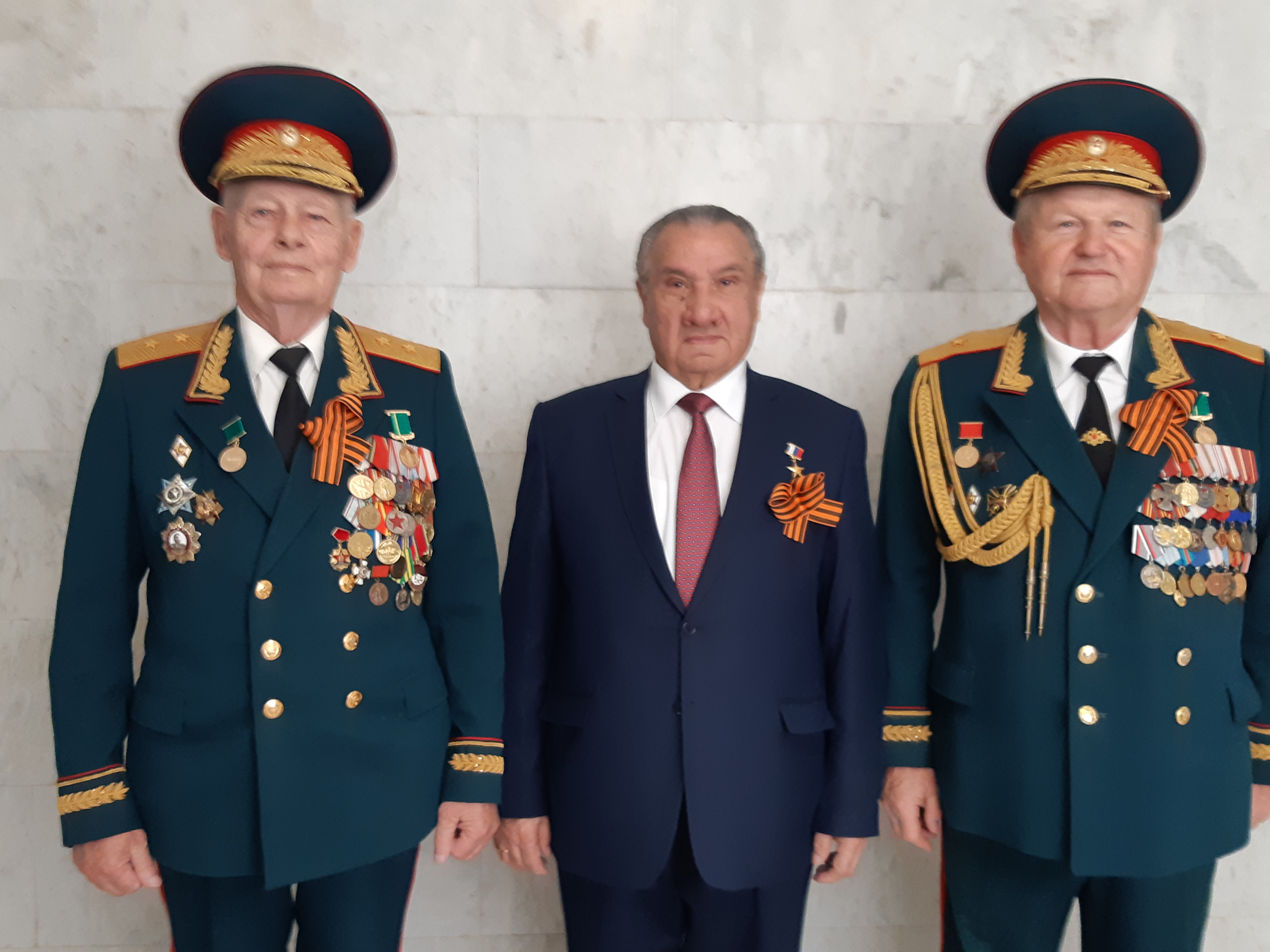 Машбаш с генералами Ю.Щепиным и А.Дорофеевым. Майкоп 7 мая 2019 г.